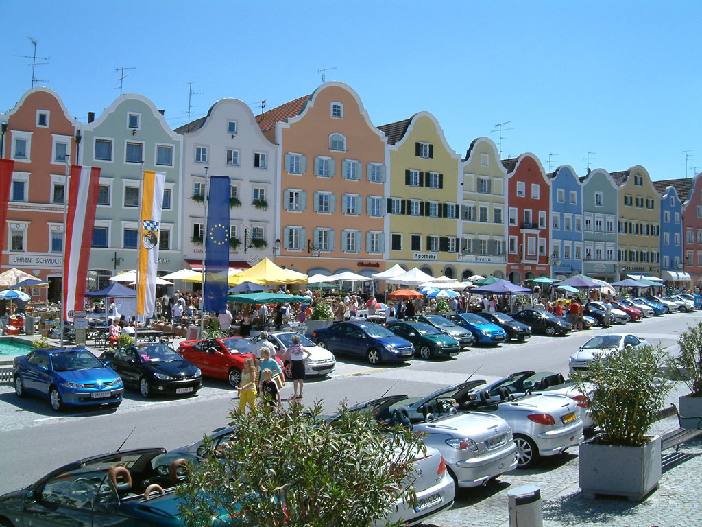 Marktplatz Schärding in Oberösterreich